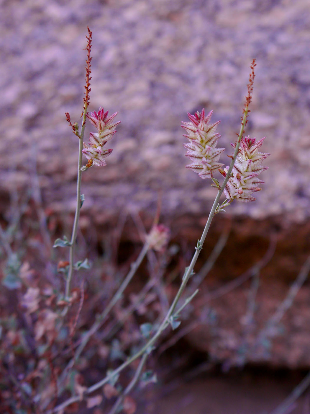 Dyerophytum africanum in Vogelfederberg (Namibia).